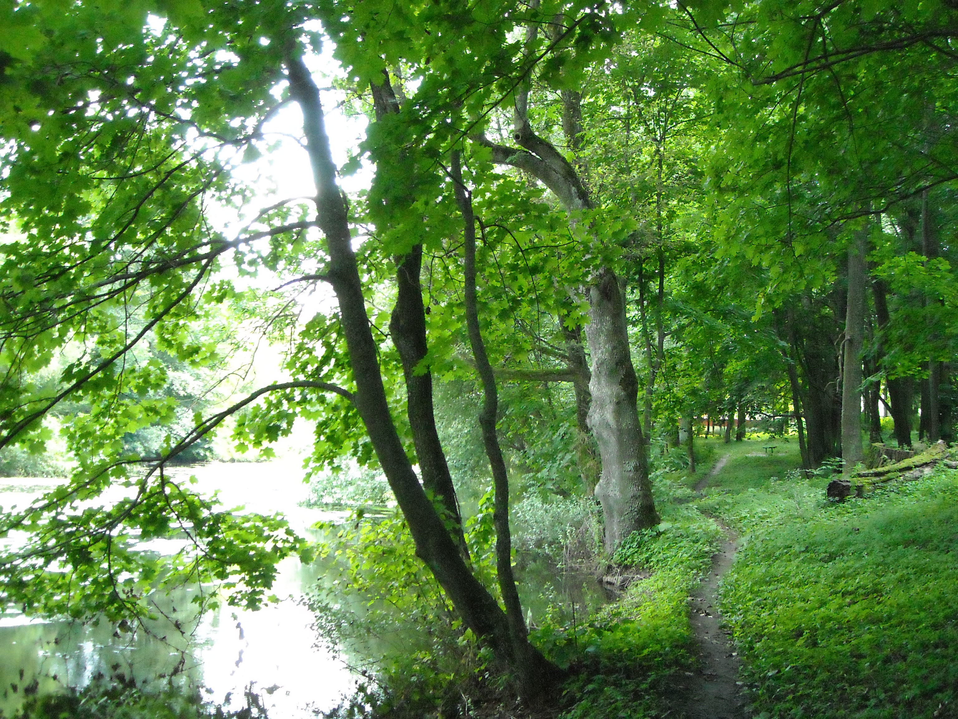 Беларуская (тарашкевіца): Палацава-паркавы комплекс Козелаў-Паклеўскіх. в. Красны Бераг This is a photo of Belarusian heritage monument. Reference number: 312Г000324 ( WLM)